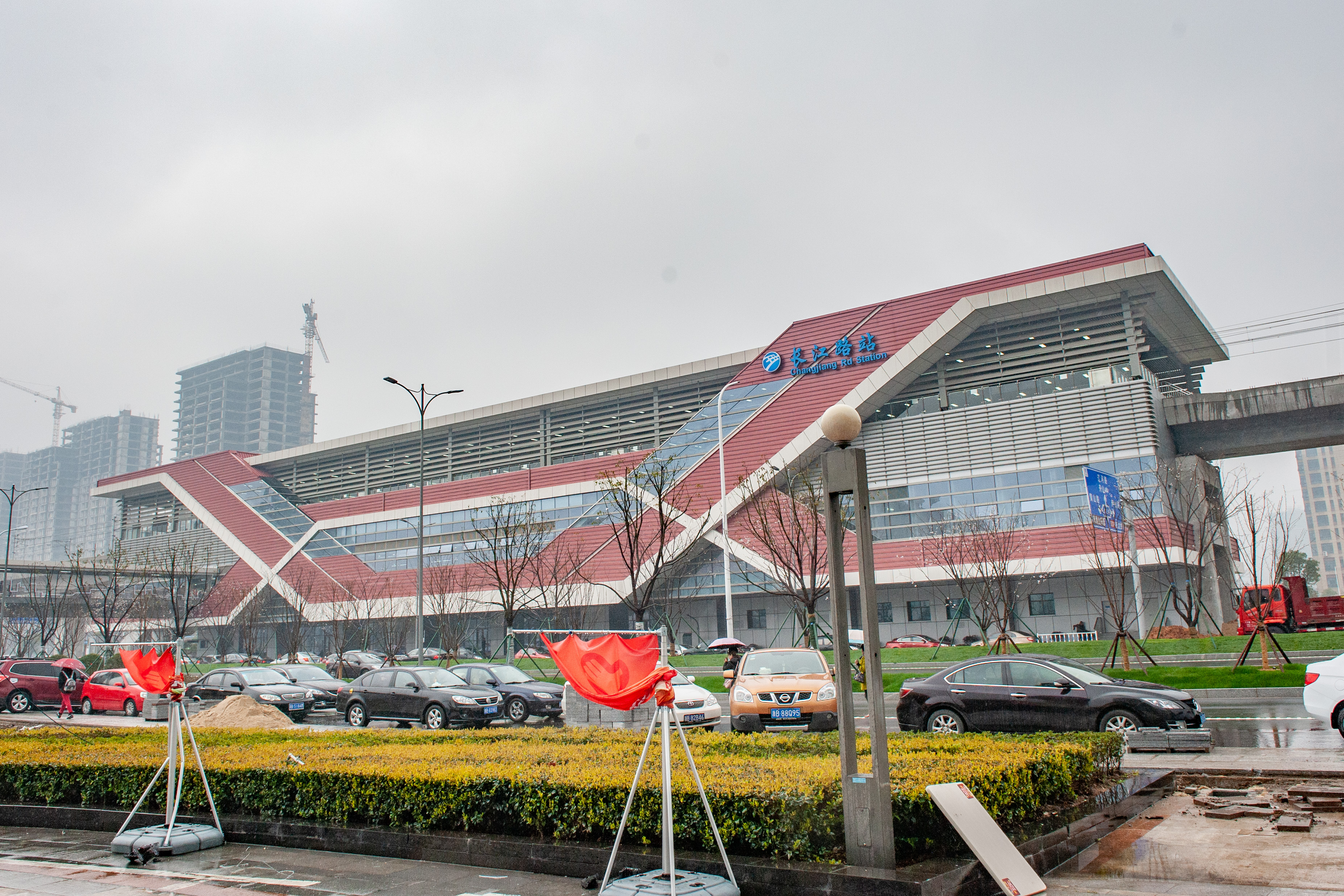 宁波地铁长江路站